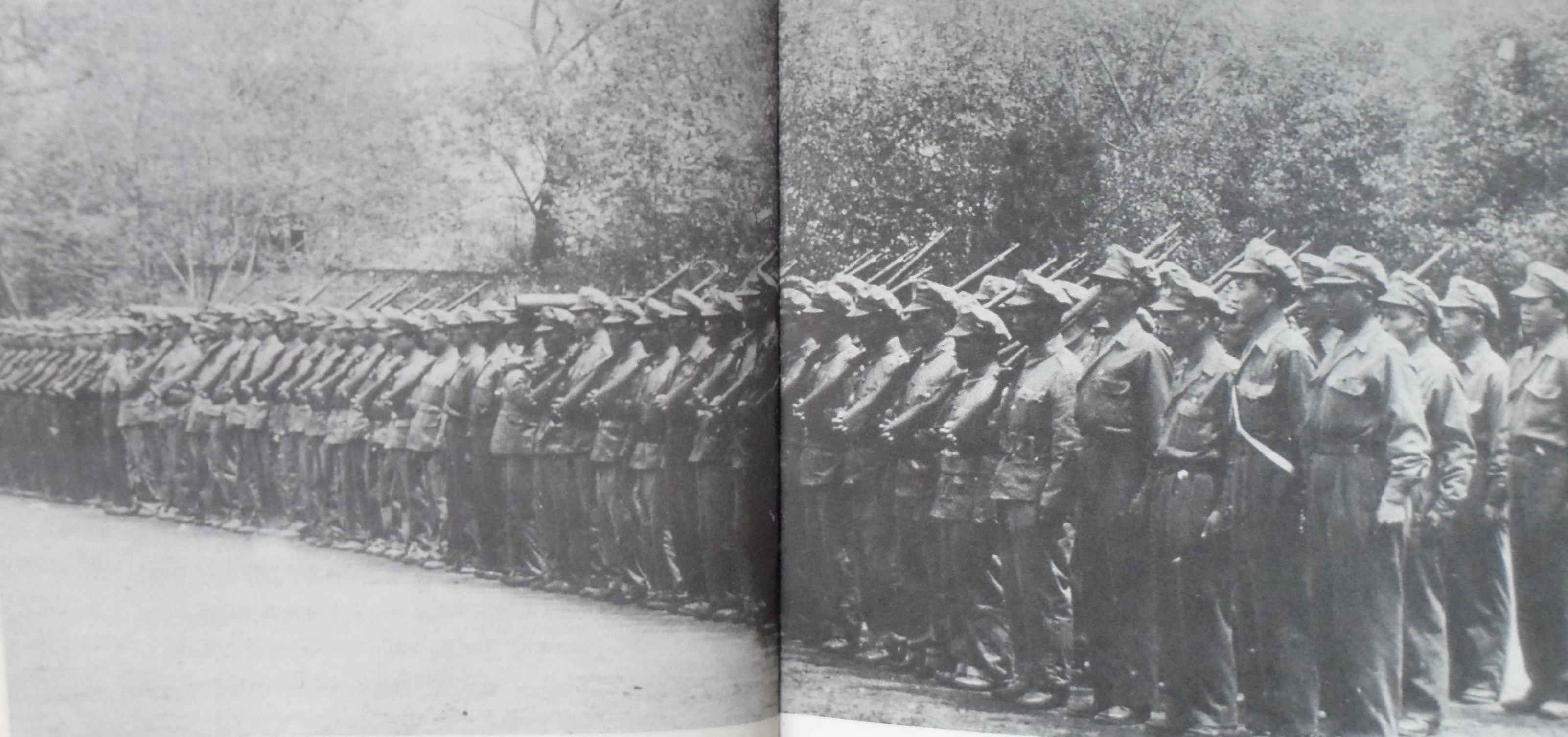 中文（中国大陆）: 在西安接受检阅的韩国光复军